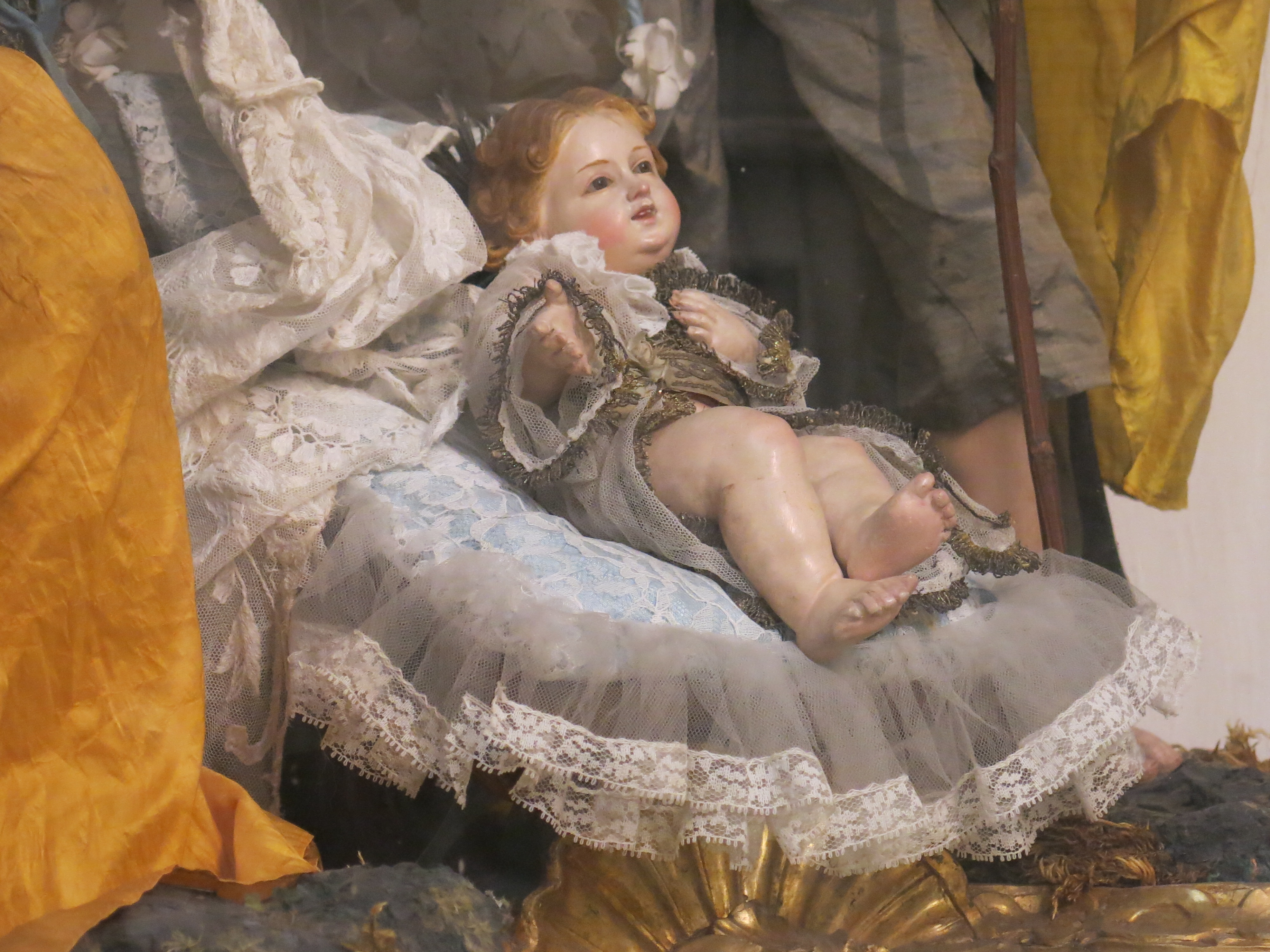 Le chiese di Napoli